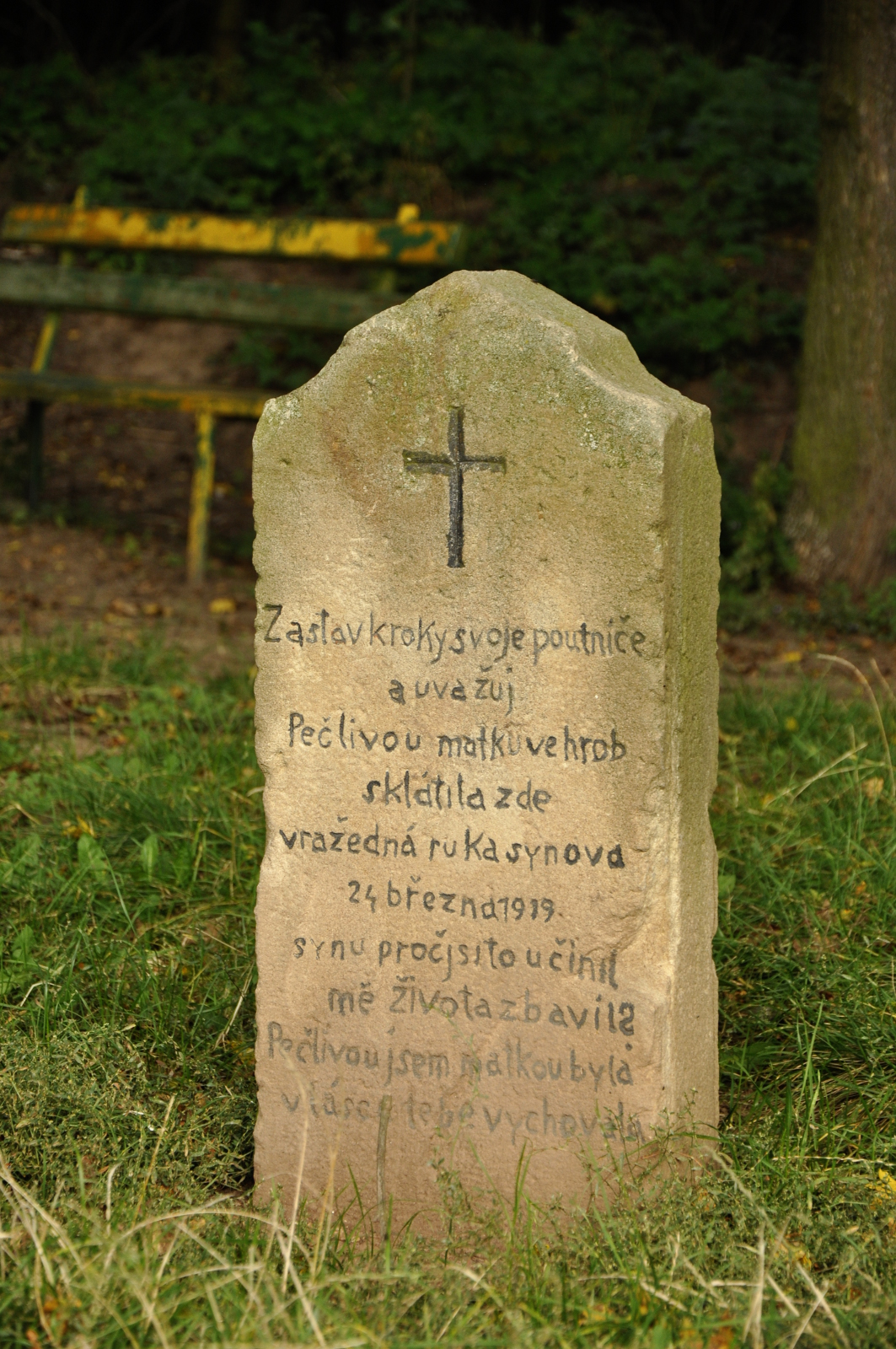 Pamětní kámen (Padochov), u lesa, Padochov